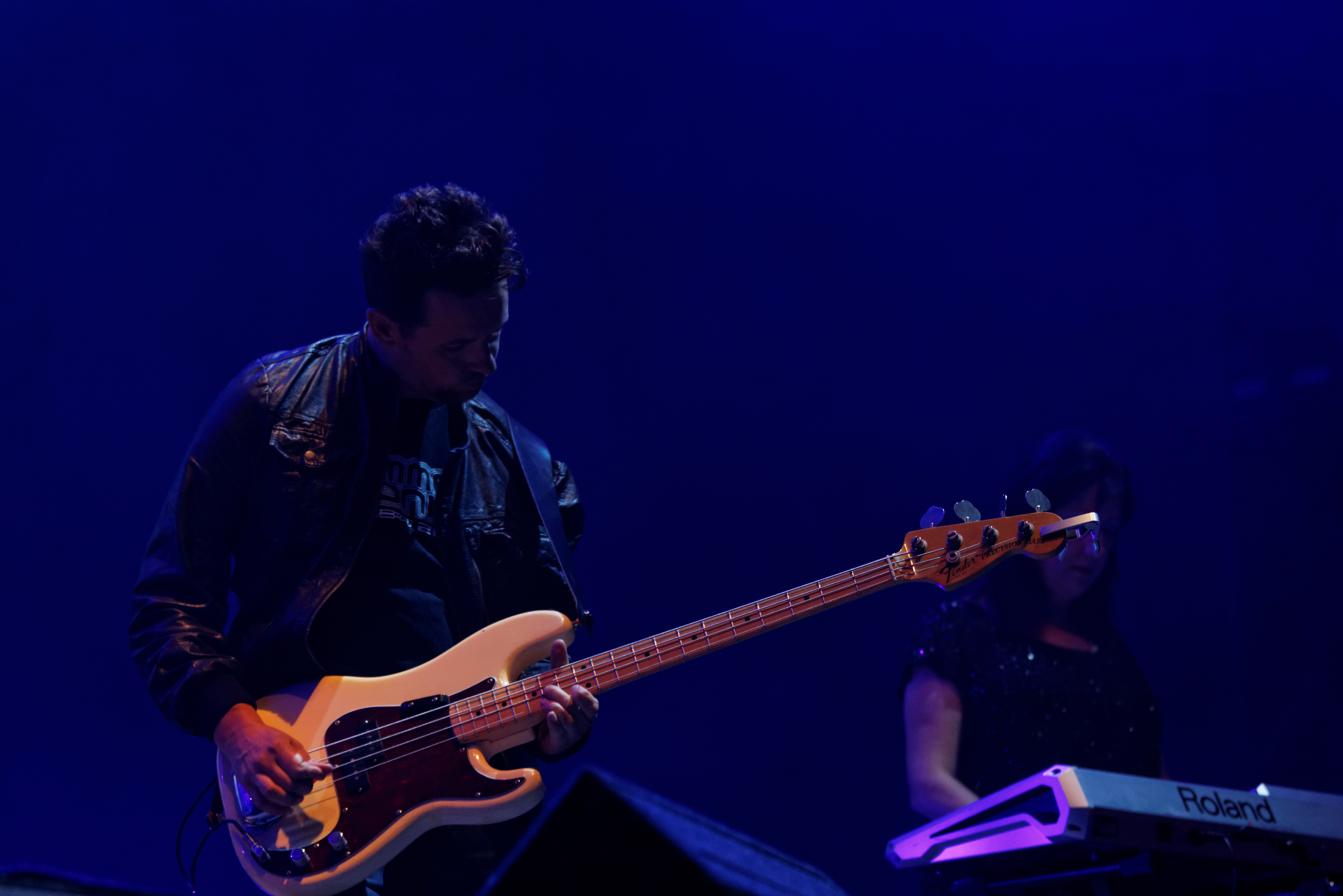 New Order en concert sur la grande scène lors de la fête de l'Humanité 2012.